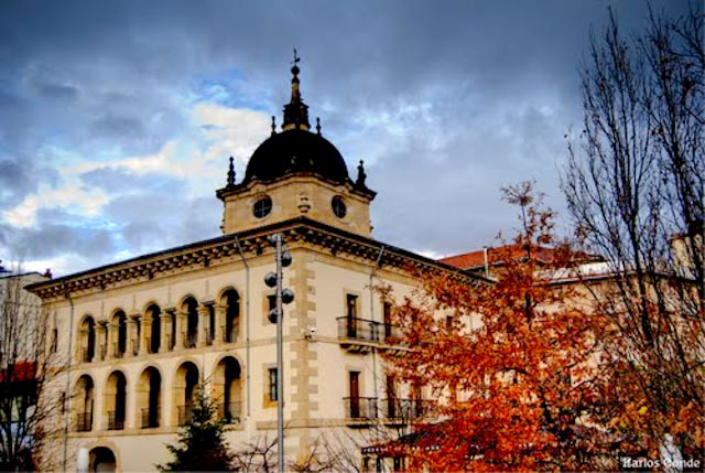 Palacio Marqués de Valdespina